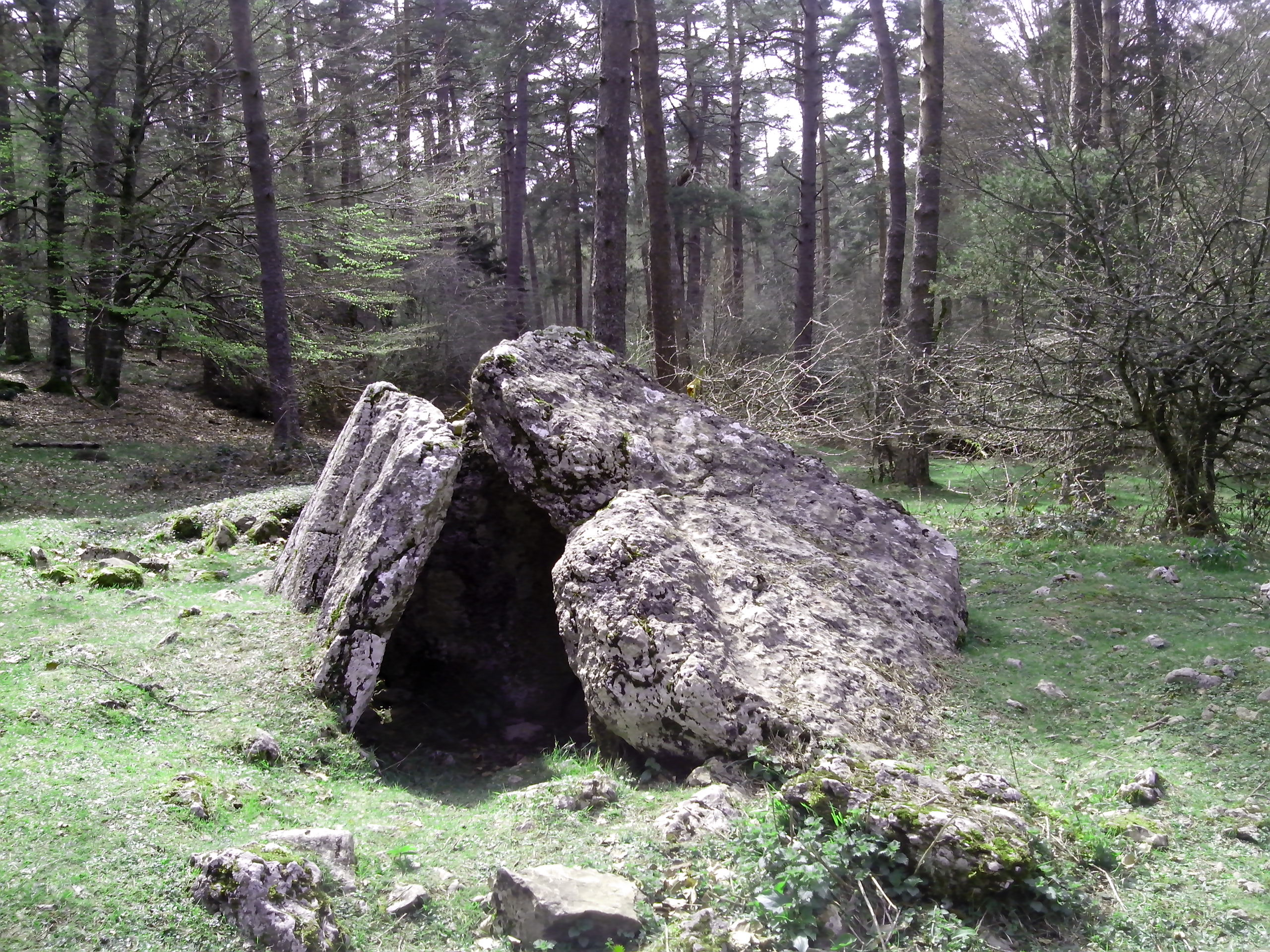 Dolmen Albia, 2000-900 AC, Edad del Bronce, Navarra.